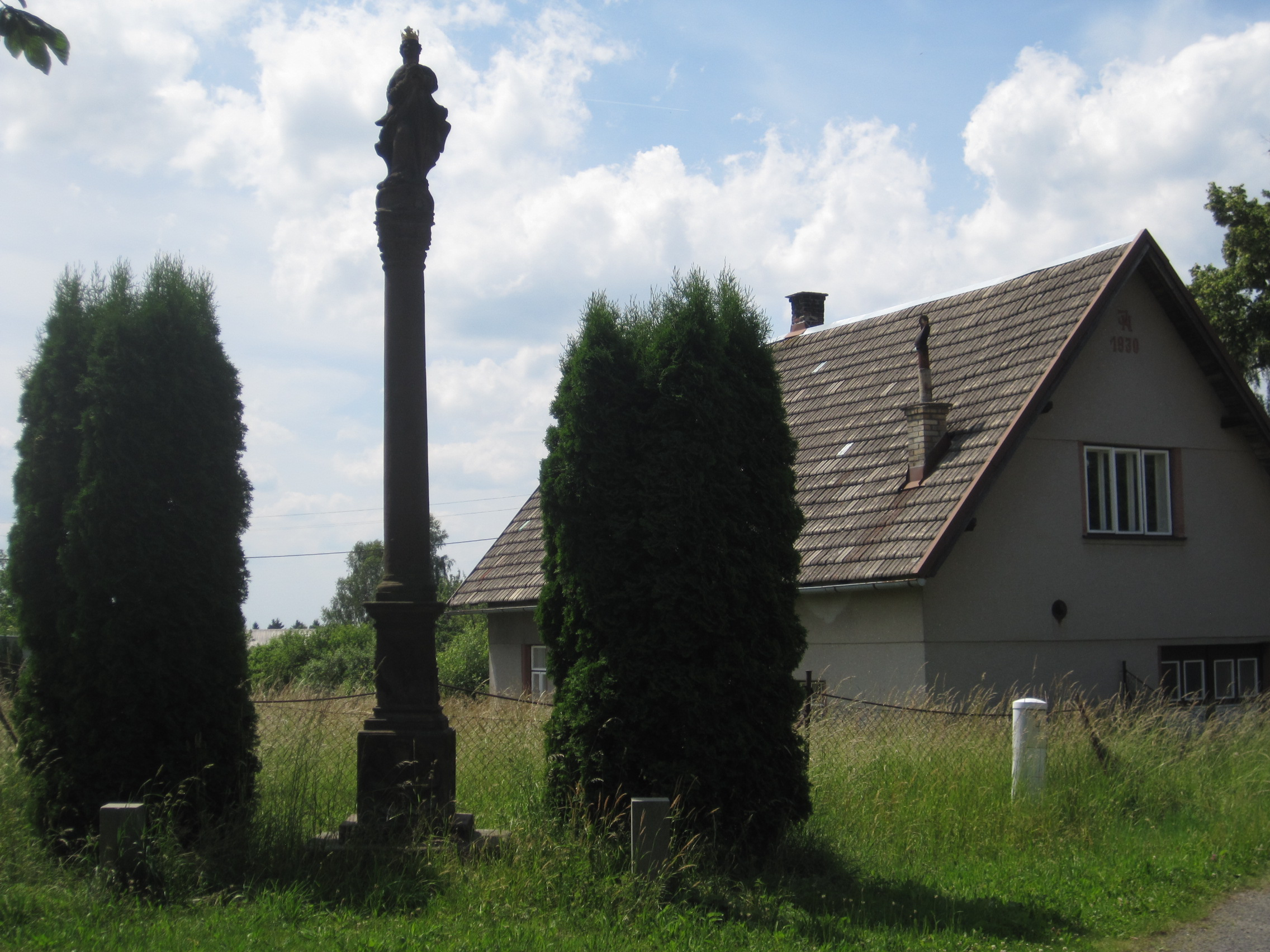 Socha Panny Marie Immaculaty, Roztoky u Semil.